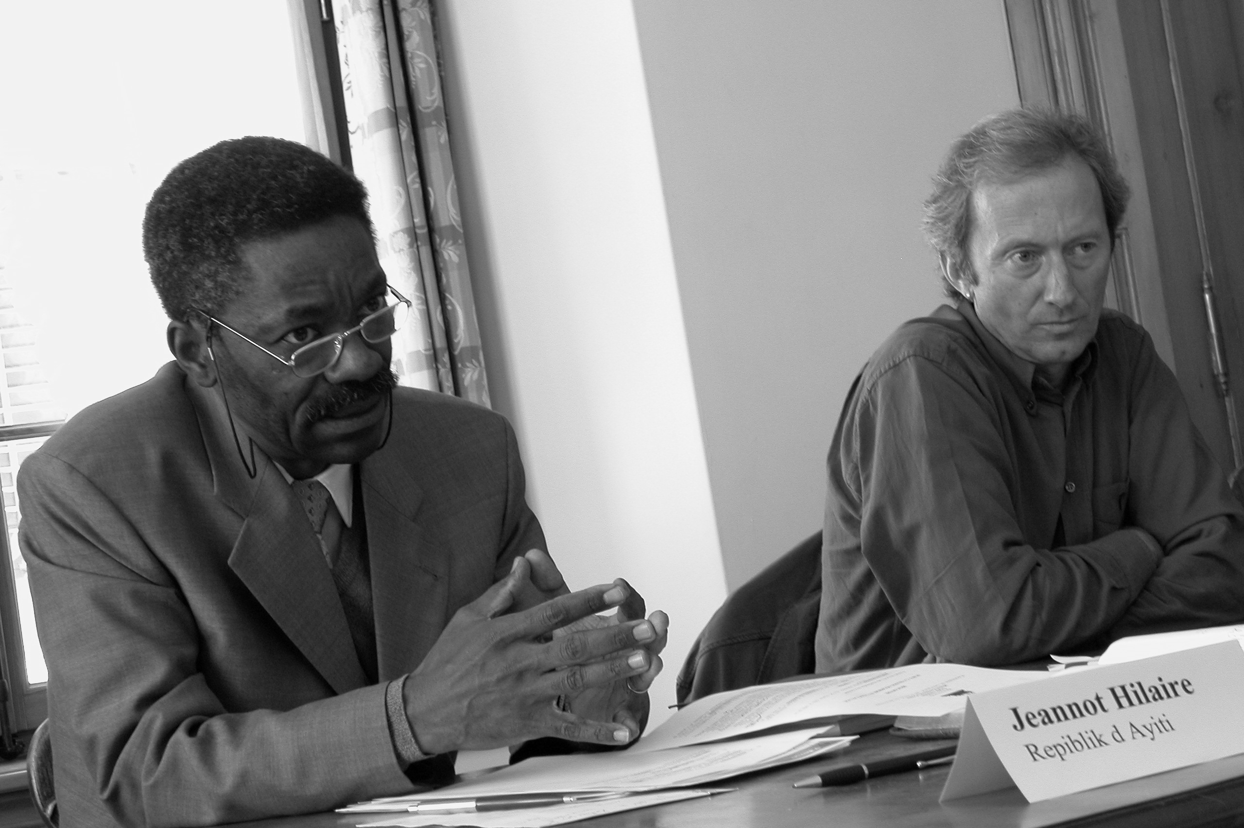 Hans Fässler mit Jeannot Hilaire, Historiker und Vertreter Haitis bei der UNO in Genf. Anlass: “Rencontre des trois mondes” im Festsaal der Kantonsbibliothek in Trogen